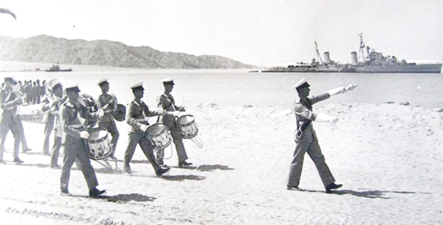 משחתת הצי המלכותי הבריטי א.ה.מ איאולוס מבקרת בנמל עקבה בהפגנת תמיכה במלך ירדן 1950